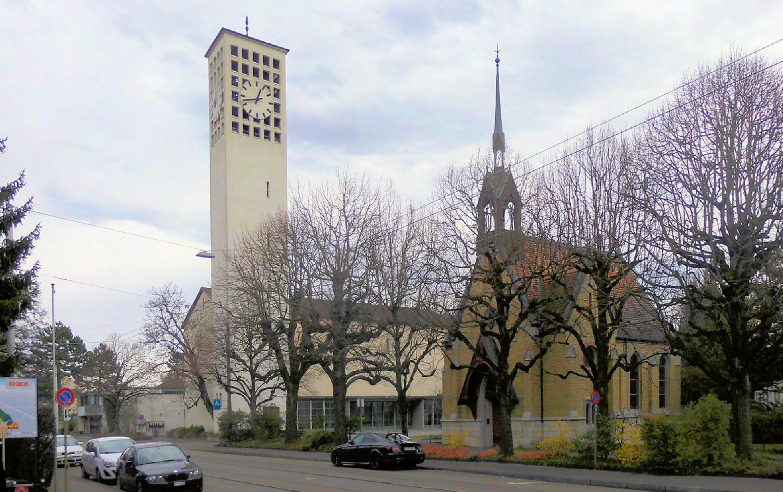 Evangelisch-reformierte Kirche in Allschwil, Kanton Basel-Landschaft, Schweiz